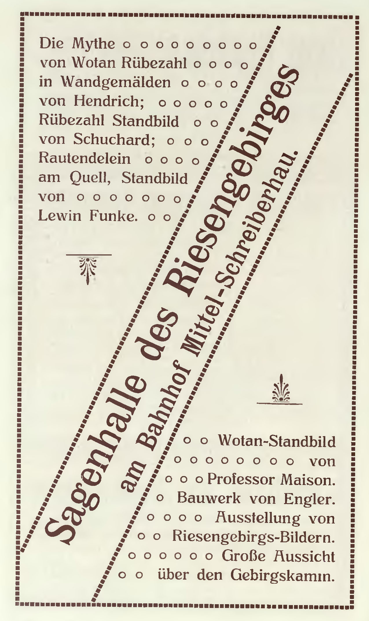 Werbeanzeige für die Sagenhalle des Riesengebirges (1912)